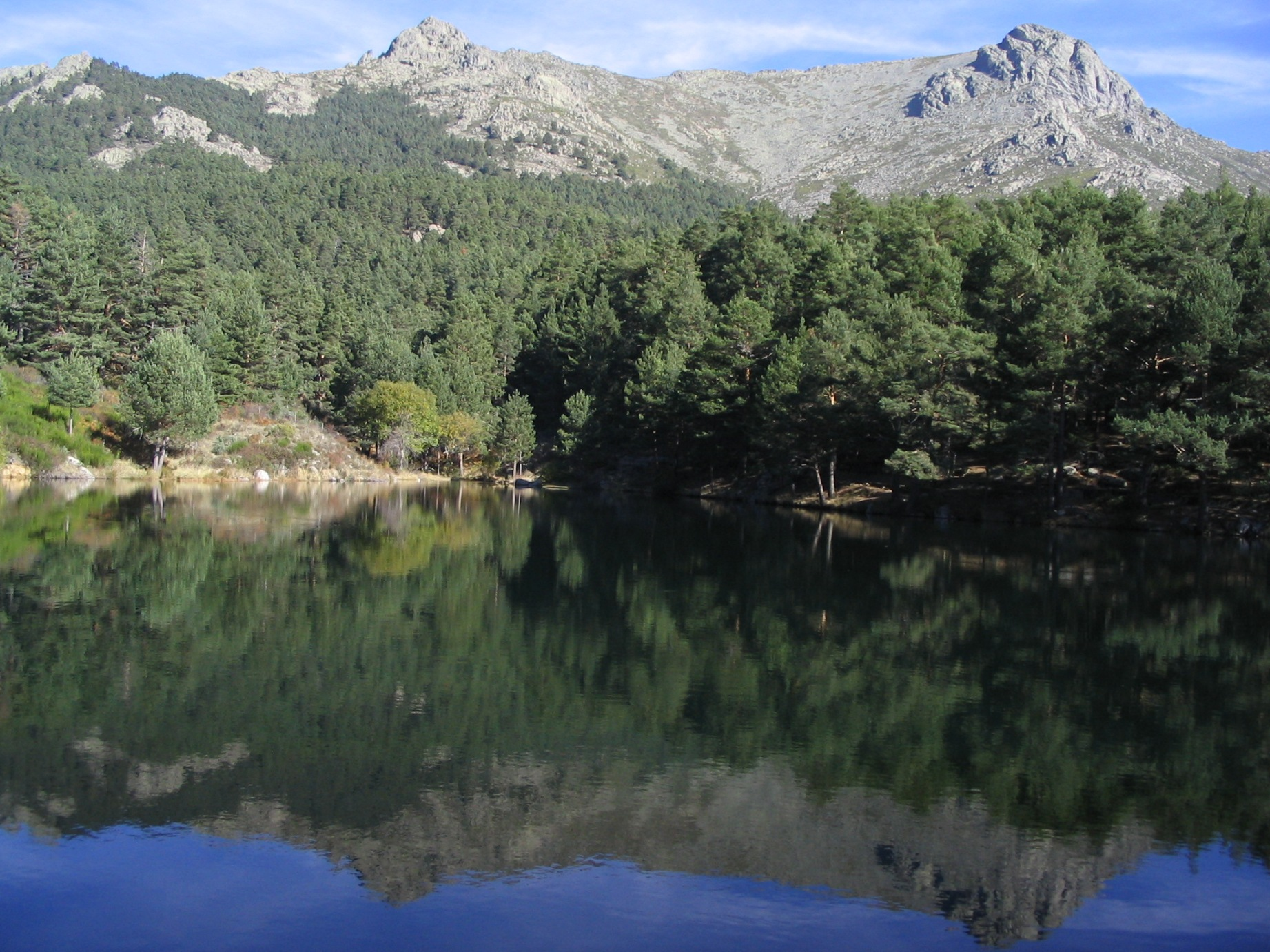 Embalse en el río Samburiel en el Valle de la Barranca (Comunidad de Madrid, España).